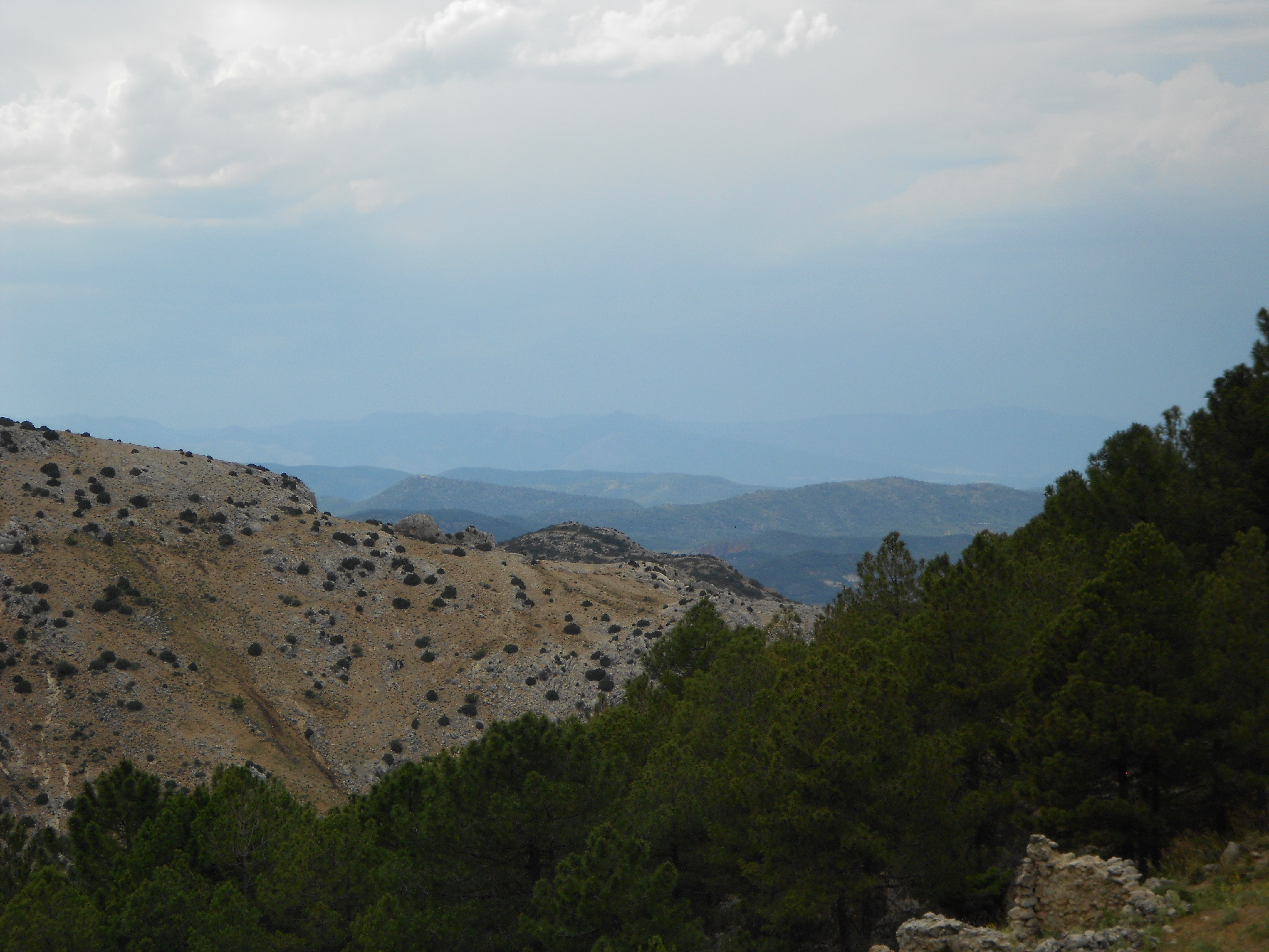 Sierra Espuña This is a photography of a Special Area of Conservation in Spain with the ID: ES0000173. Natura2000 entry, EEA entry